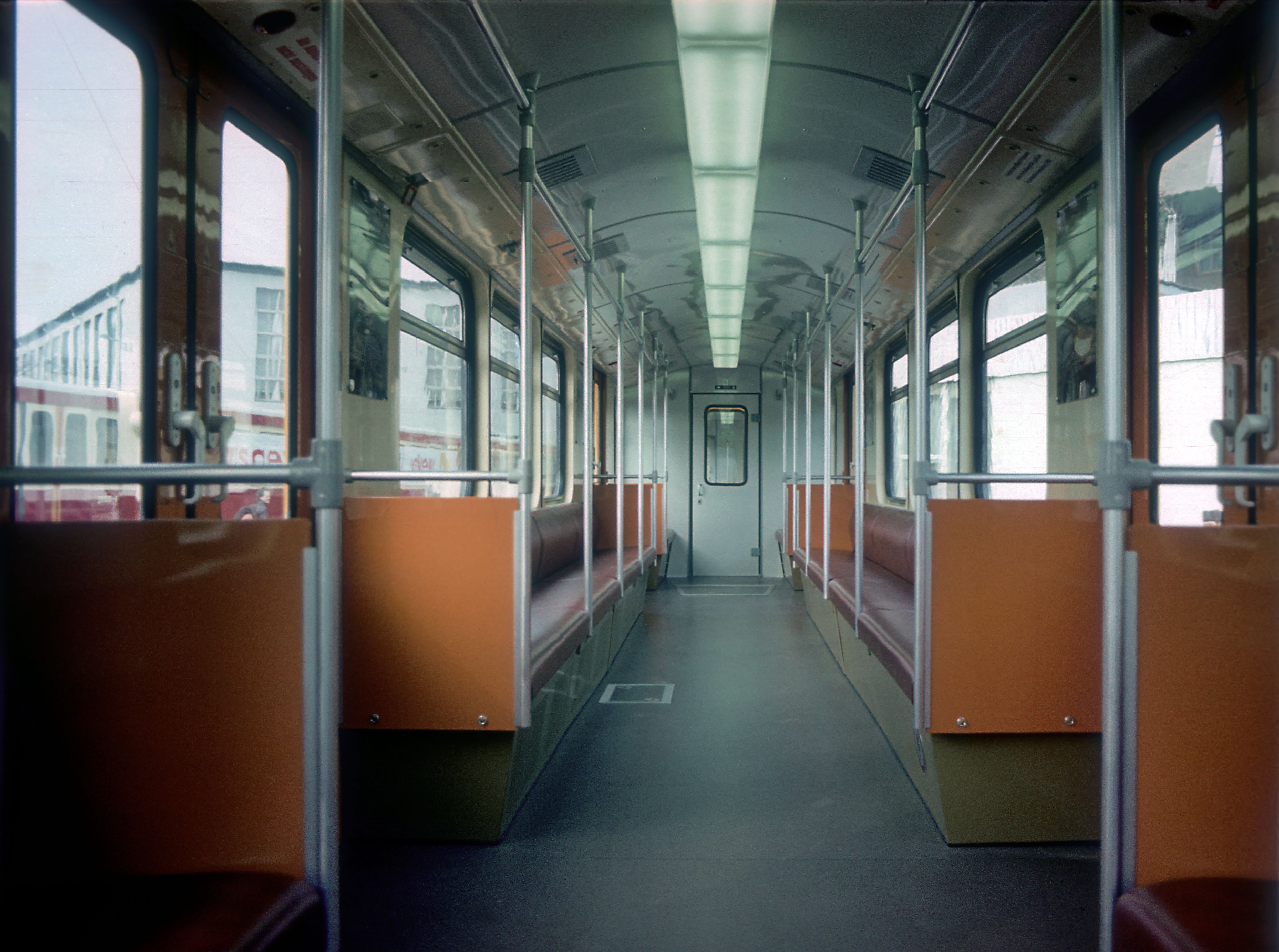 Innenraum eines GI-Triebwagens, Neuzustand 1980, Leipziger Frühjahrsmesse